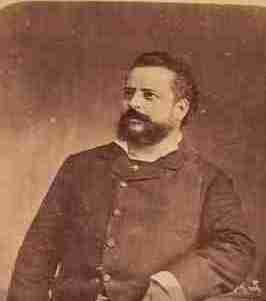 Carlo Bulterini (1839-1912)